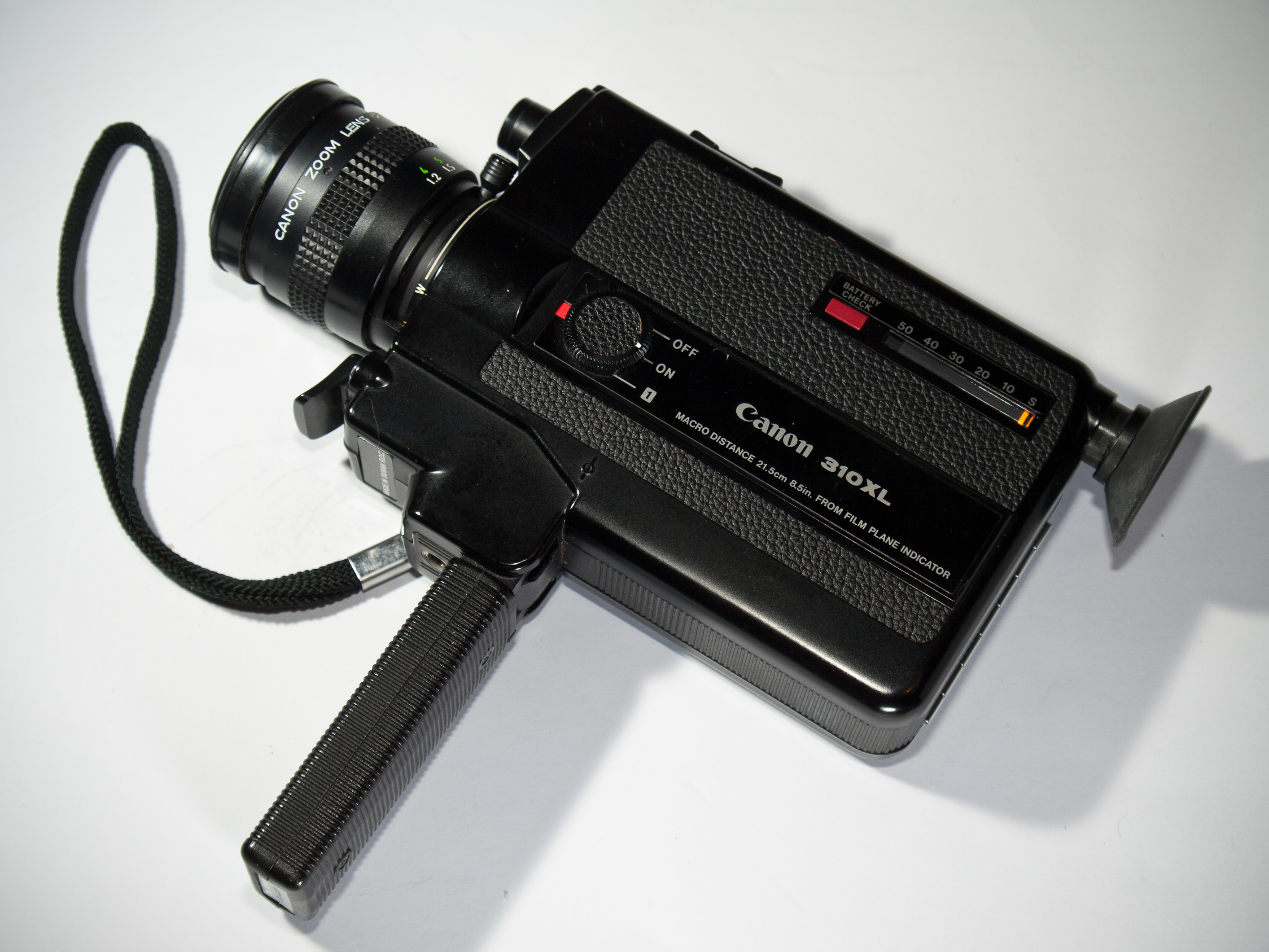 Canon 310XL Super 8 camera